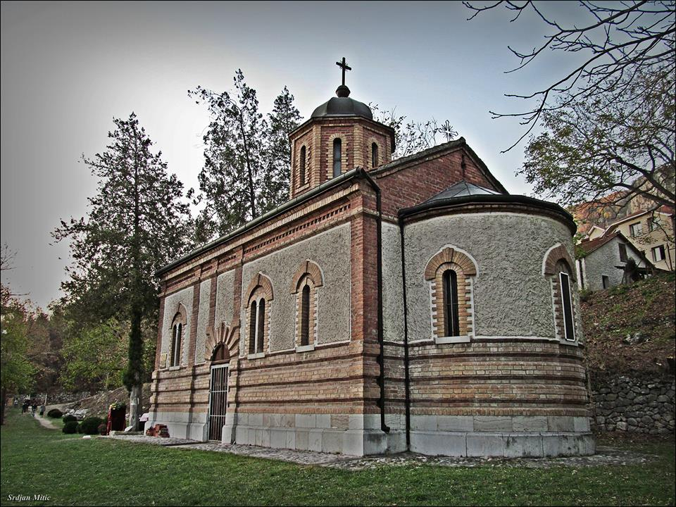 Srpski (latinica): Sićevačka klisura, Manastiru Sv.Petka Iverica, pogled sa istočne strane